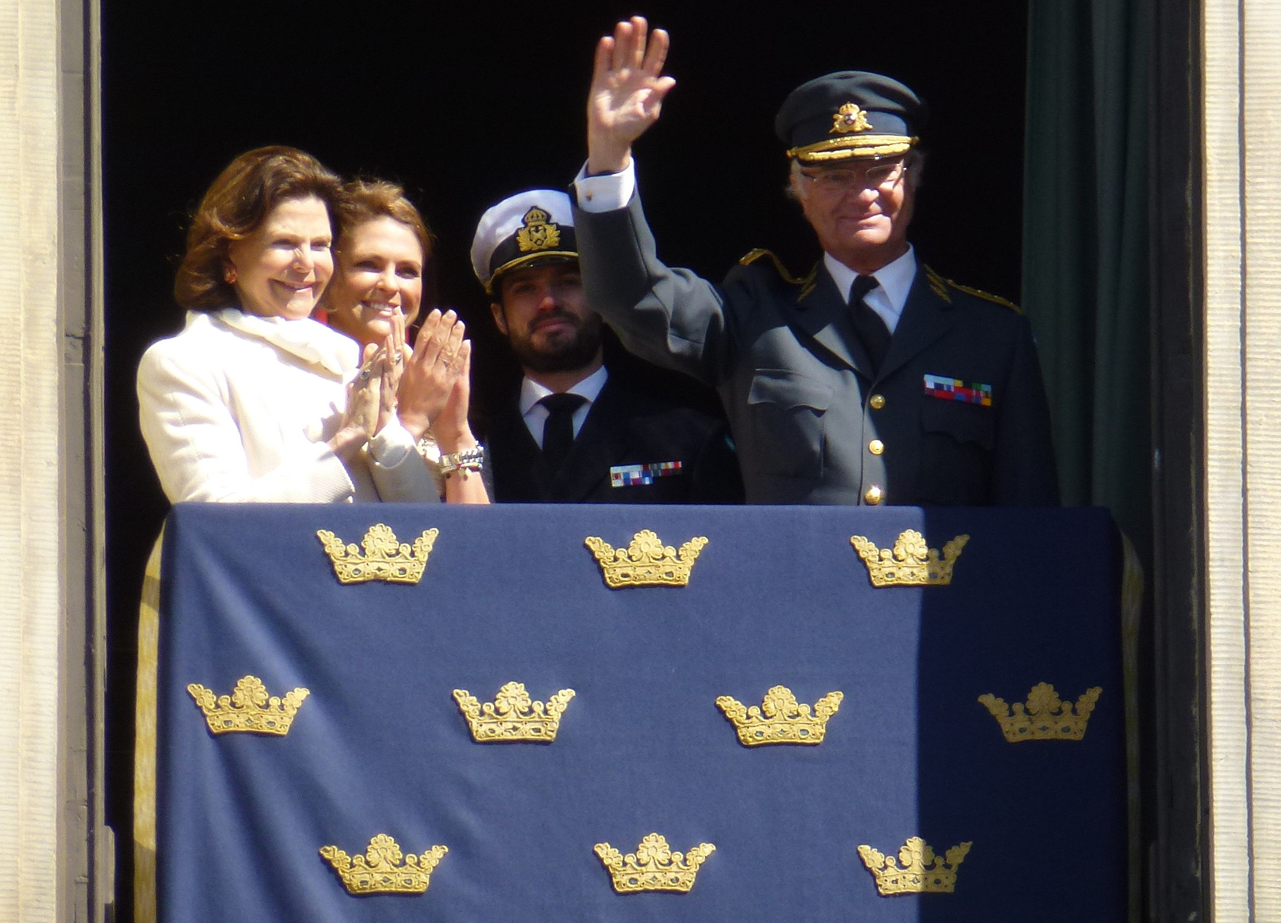 Carl XVI Gustaf på sin 67 års dag med Silvia, Carl Philip och Madeleine